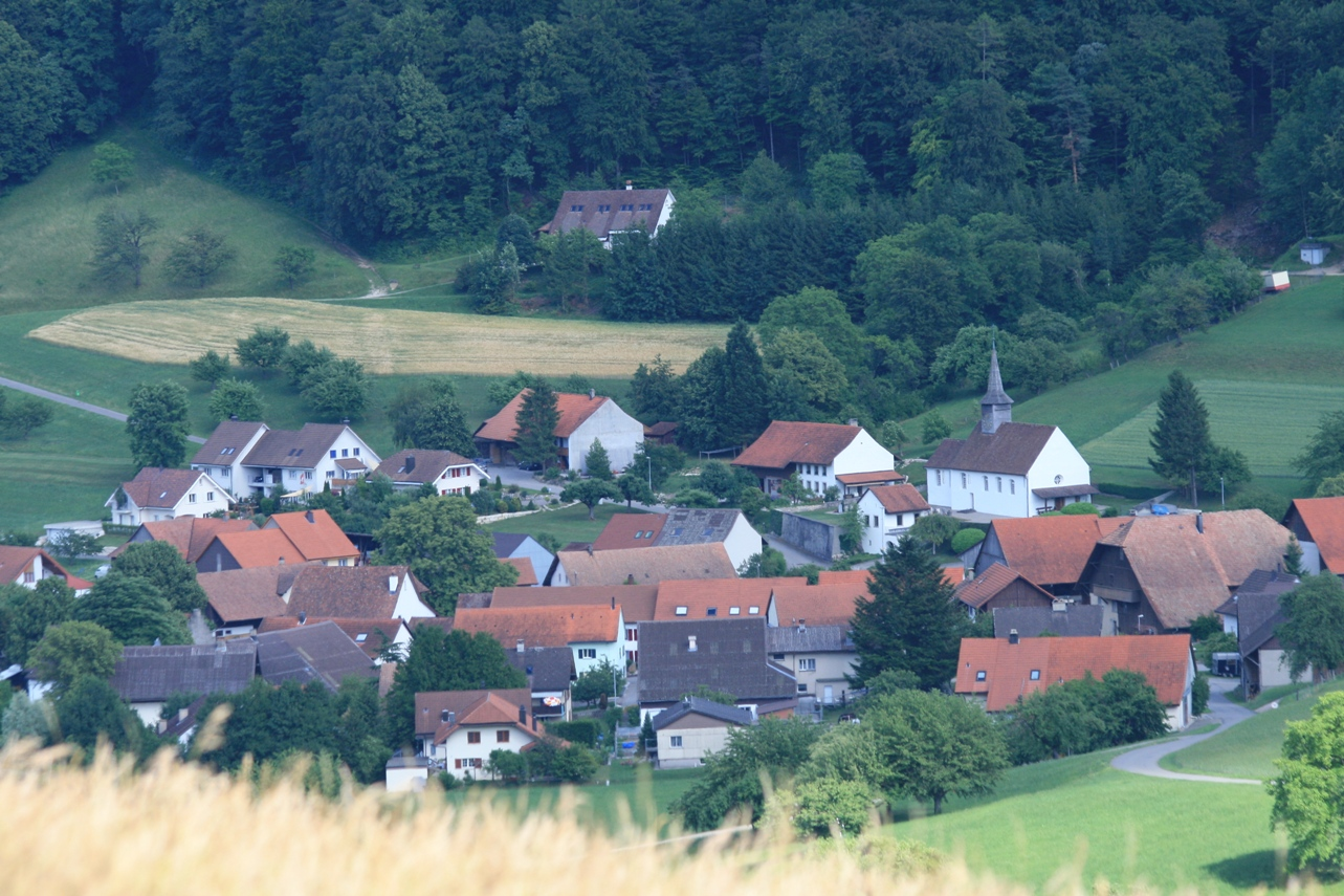 Blick auf Thalheim